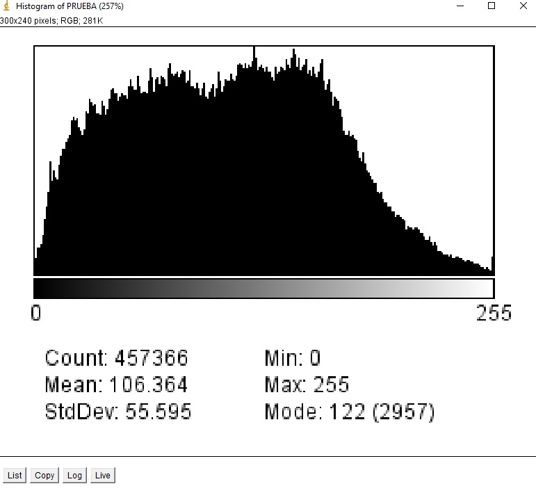 Histograma Prueba ByN ecual. automatica